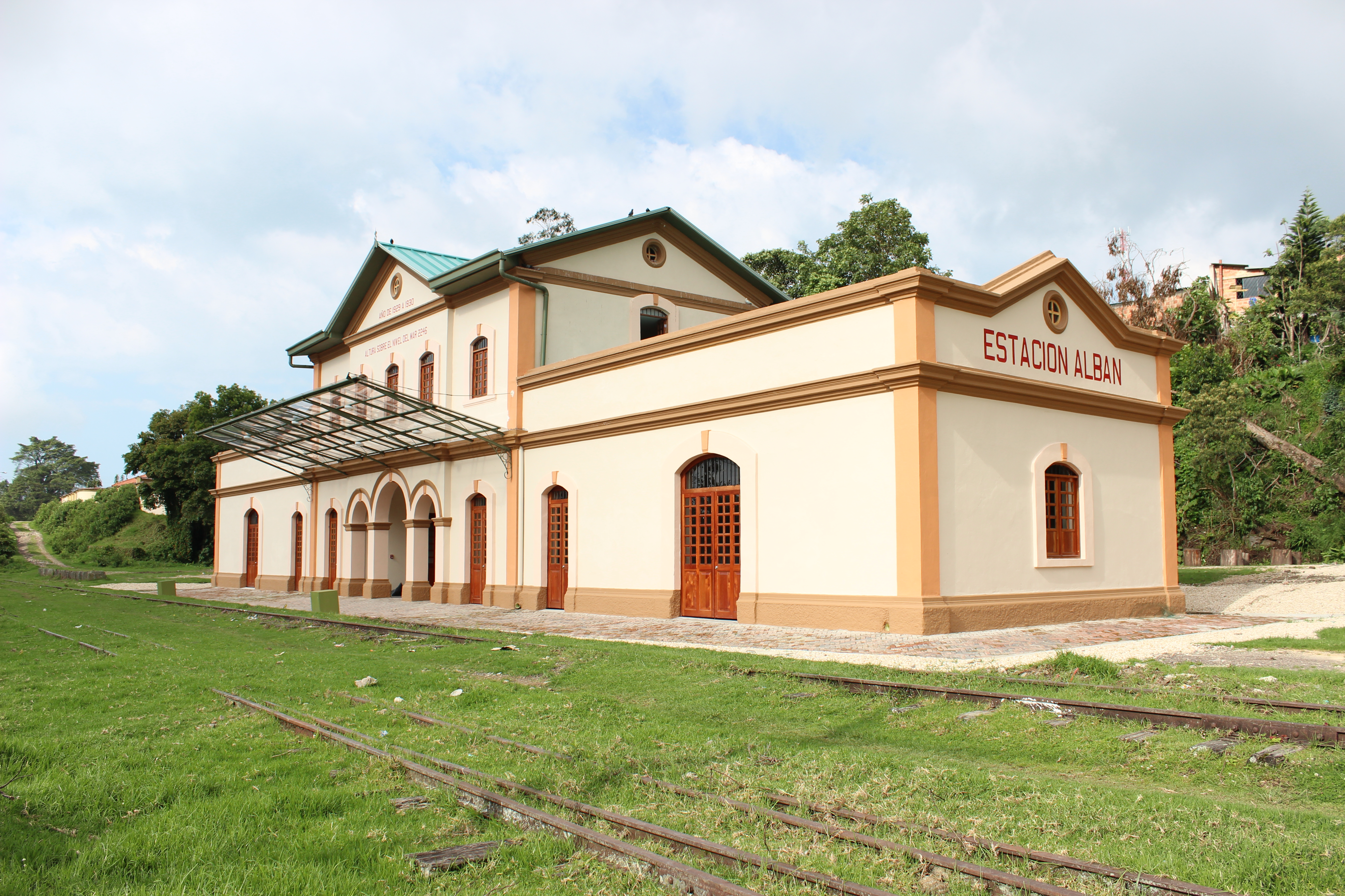 Estación del Ferrocarril Alban